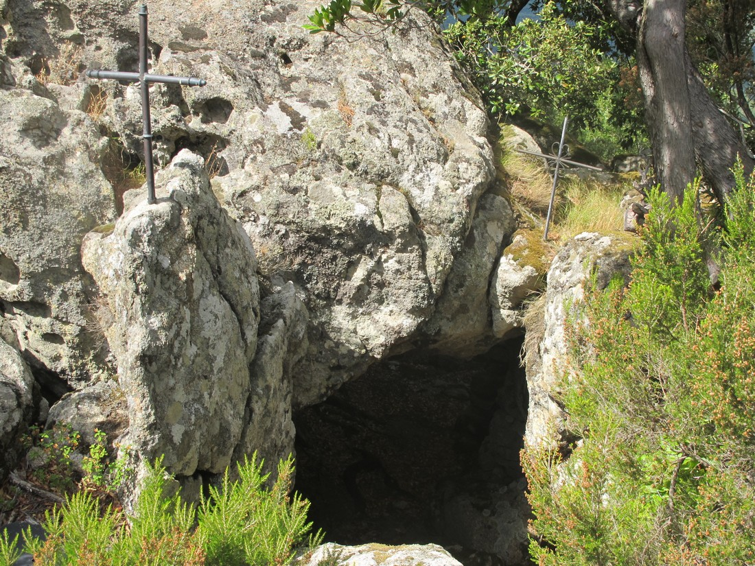 Le site de la grotte d'U Circinellu, marqué par deux croix dans un chaos rocheux.